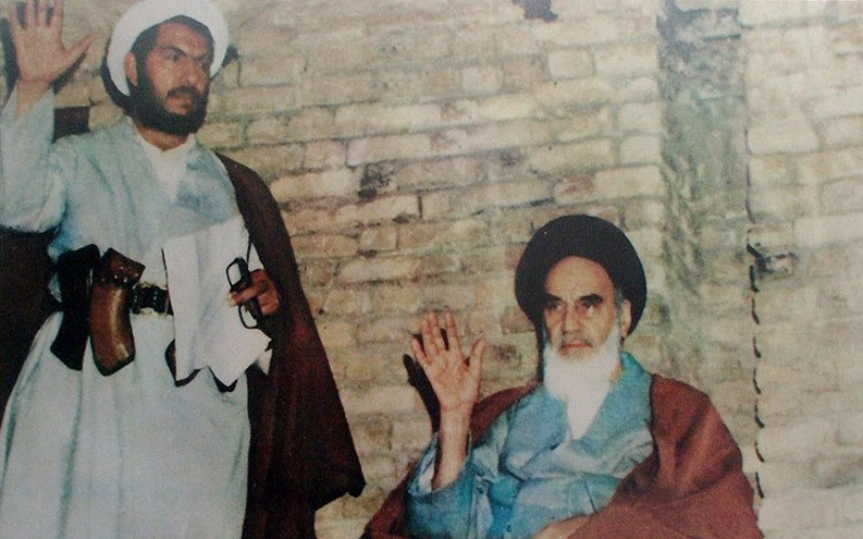 غلام رضا حسنی در دیدار با الله خمینی